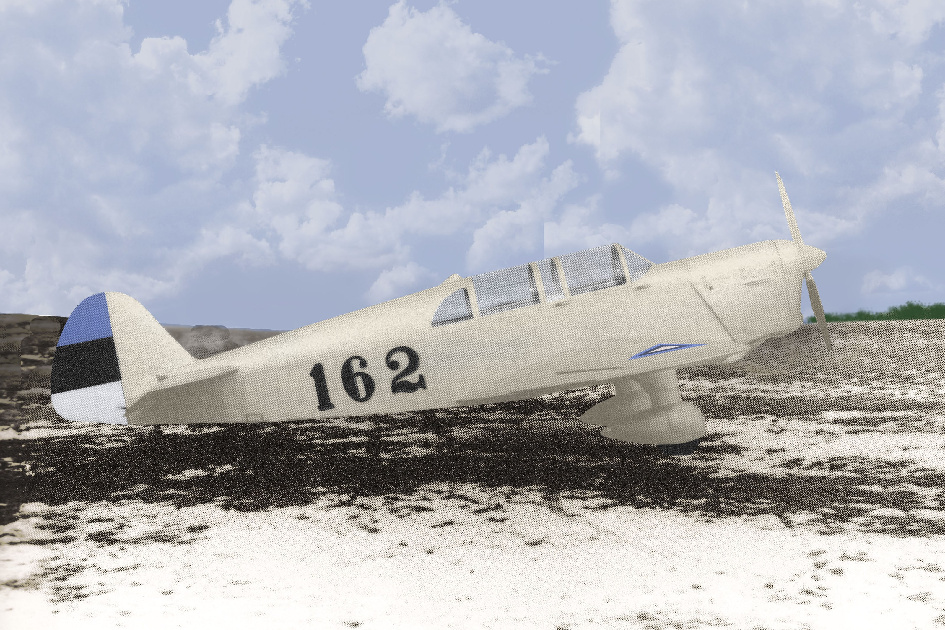 Самолёт авиации Эстонской республики PTO-4A